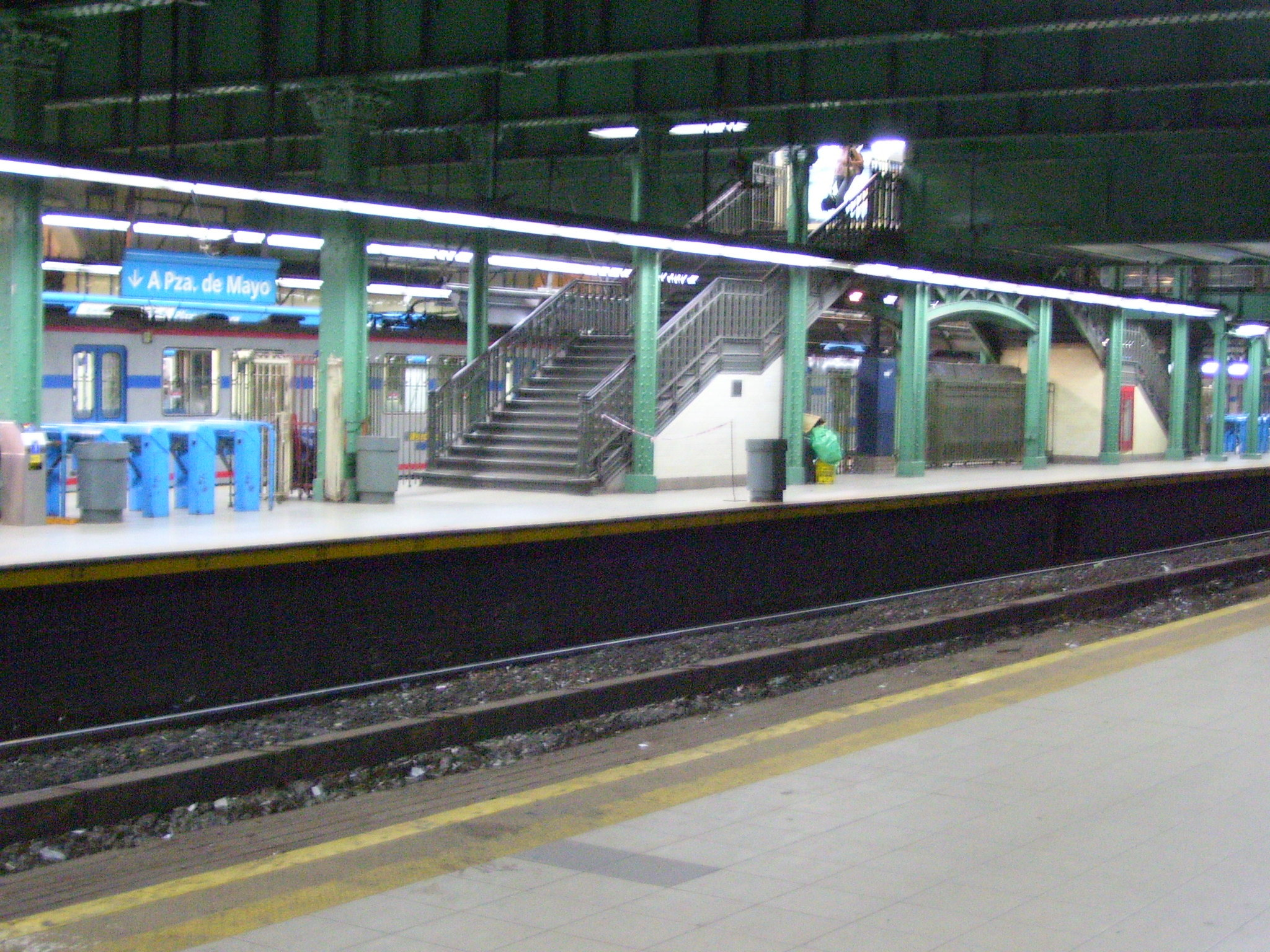 Estación Plaza Miserere. Andén a Plaza de Mayo. Línea A. Buenos Aires, Argentina